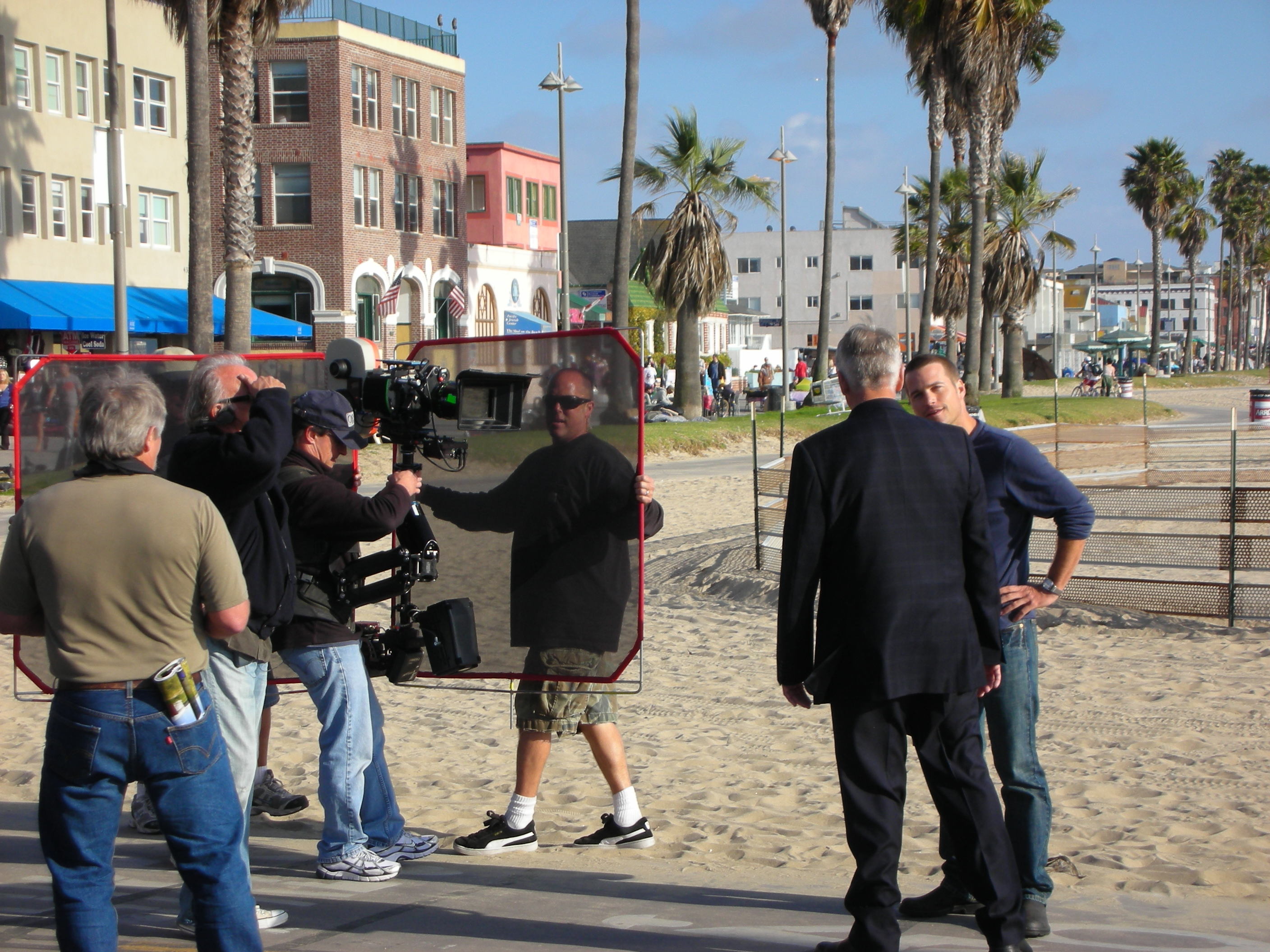 NCIS Filming